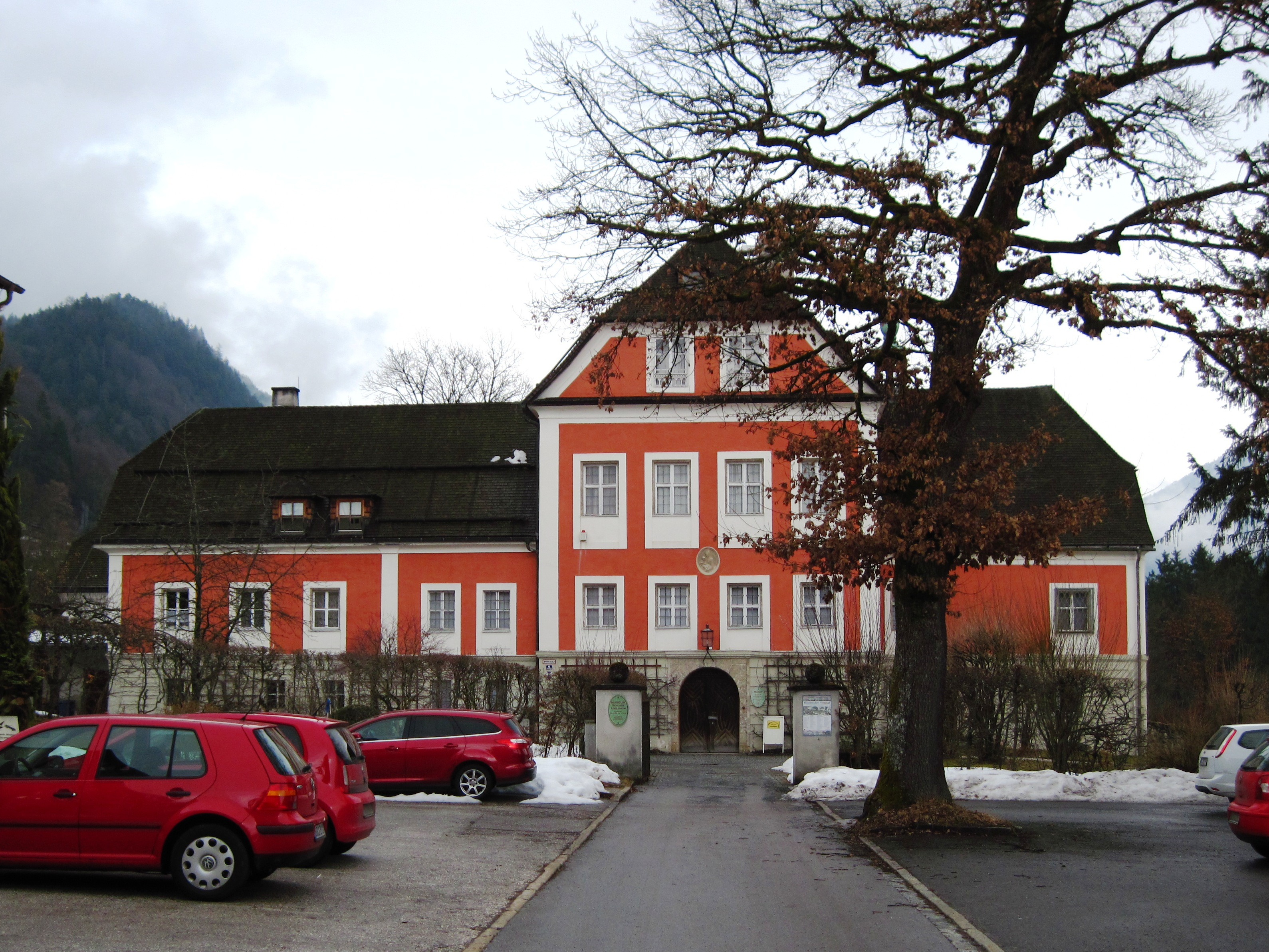 Schloss Adelsheim (jetzt Museum) in Berchtesgaden, Schroffenbergallee 6: zweigeschossiger Bau mit Halbwalmdach und Mittelrisalit mit Schopfwalm, erbaut 1614. Ansicht von Westen.